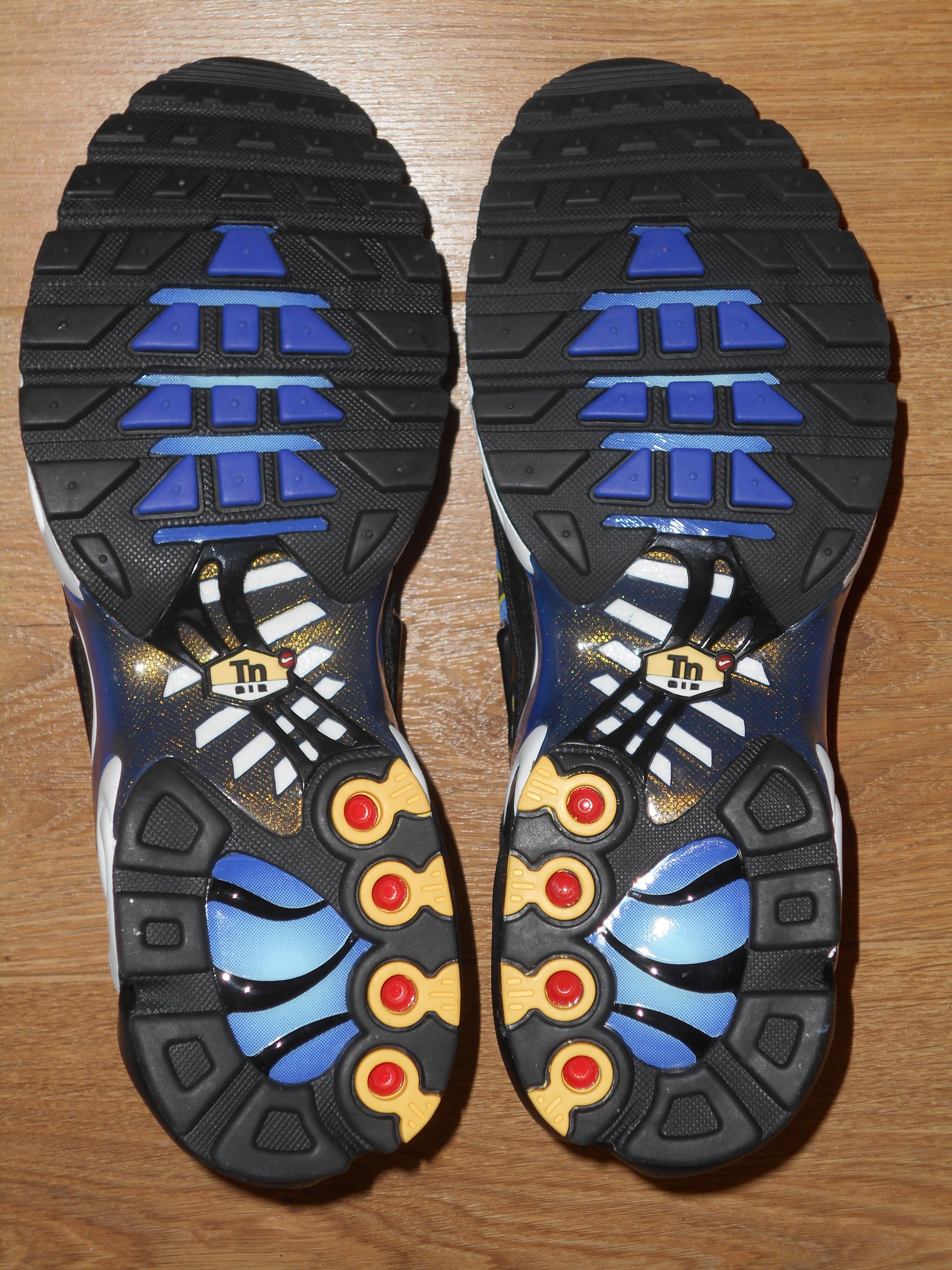 vision de la technologie Tuned